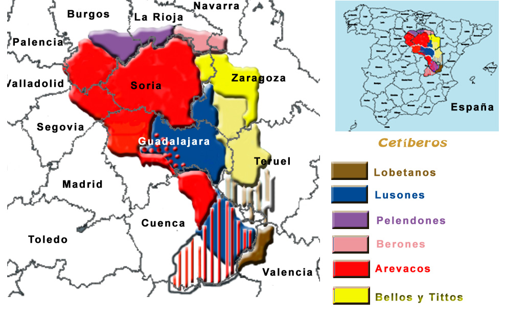 Posible situacion de los Celtíberos en la peninsula Iberica Imagen boceto user:Carlosblh Imagen final user:papix